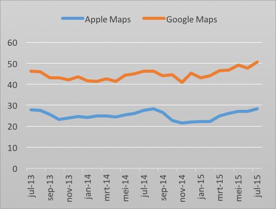 Het marktaandeel van Apple Maps en Google Maps in de Verenigde Staten onder smartphonegebruikers. (gegevens van ComScore)